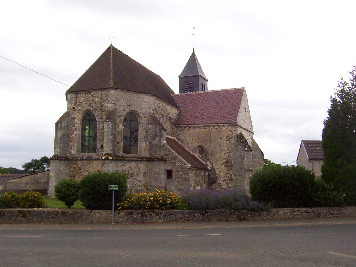 Eglise du Vézier